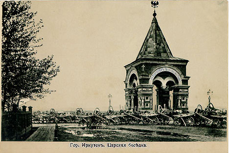 Арка цесаревича Николая архитектор В А Рассушин